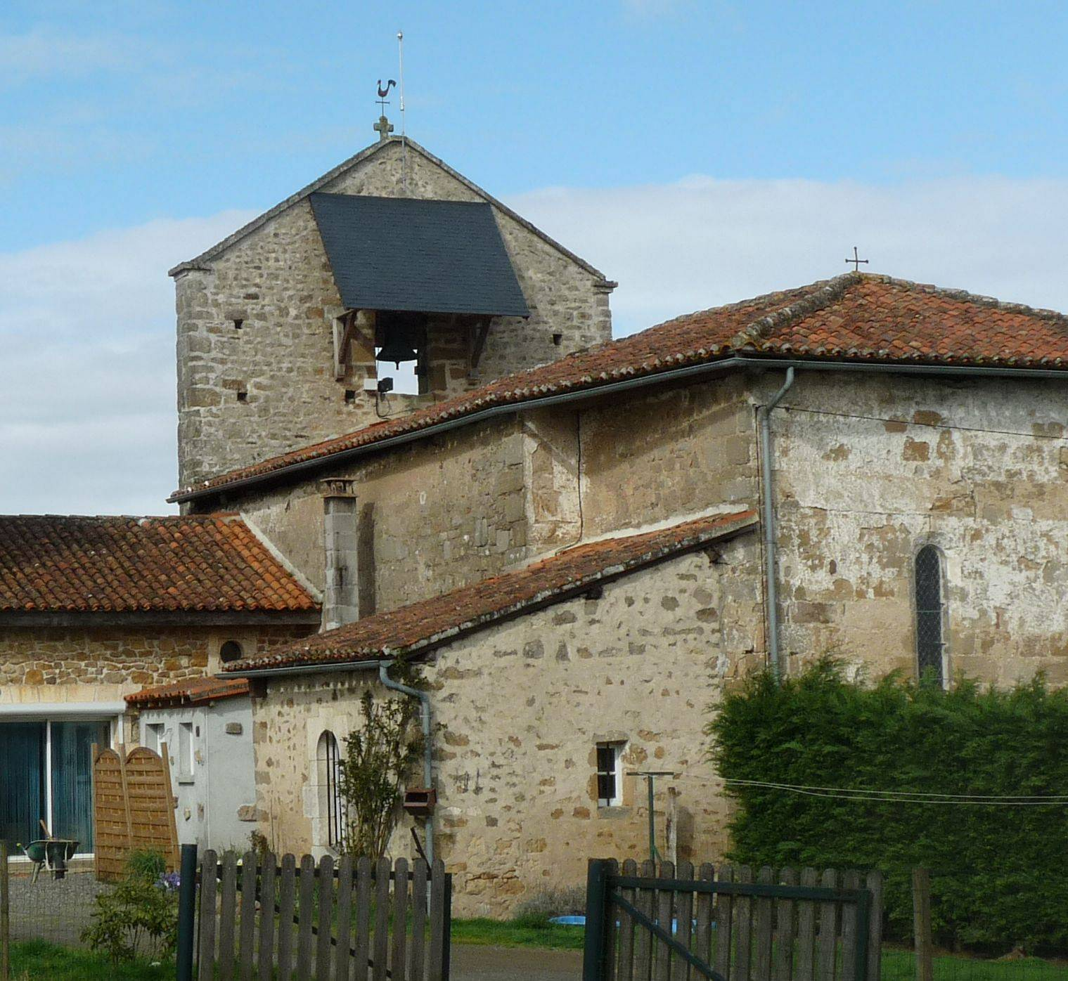 église de Mazières, Charente, France